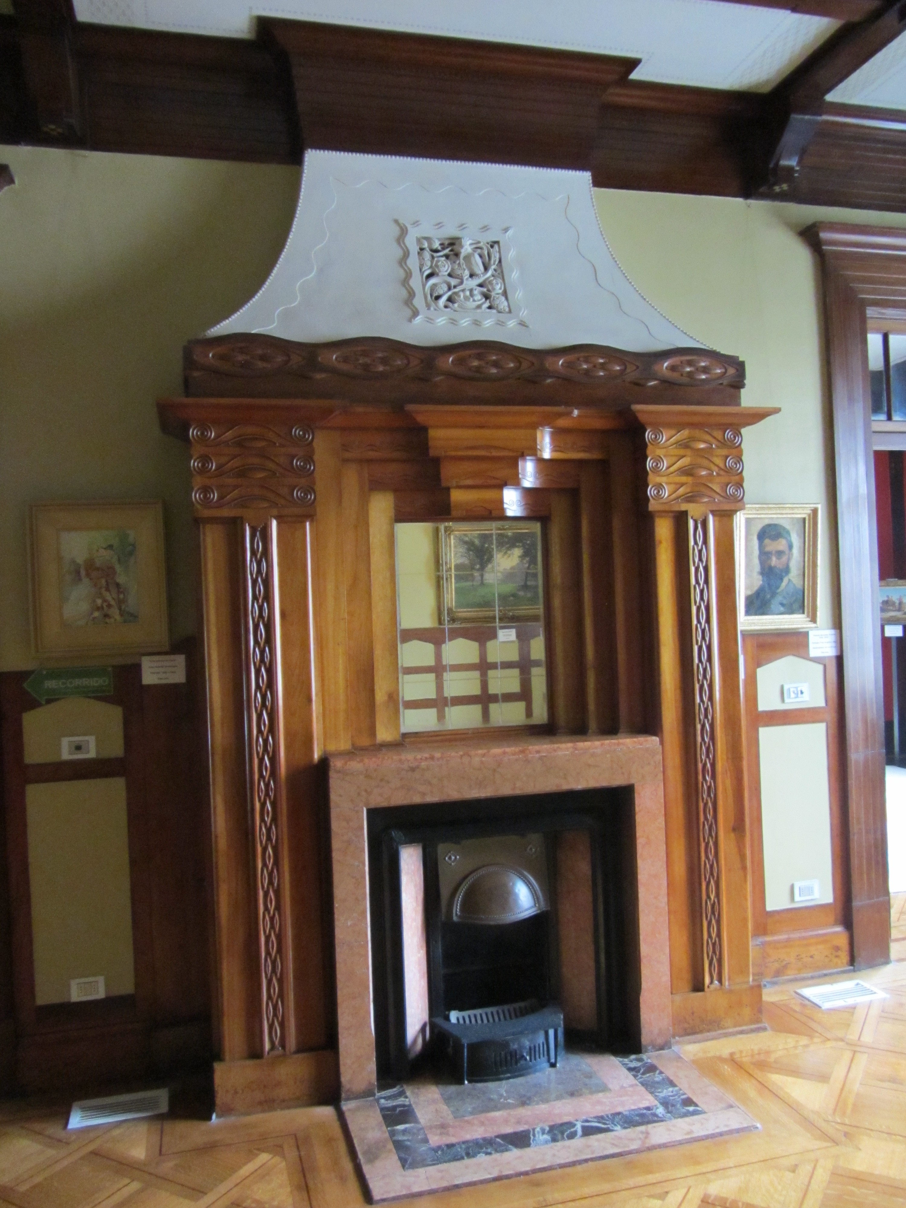 La chimenea en madera del Palacio Baburriza